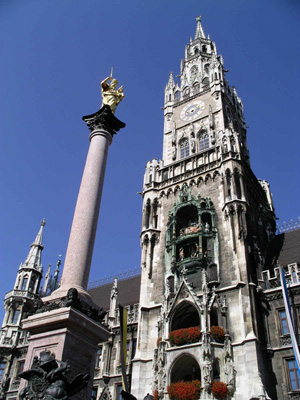 Neues Rathaus und Mariensäule in München Bild selbst fotografiert am 20. September 2003. Lizenz: GNU FDL left|100pxSiehe auch Ausschnitt (200 x 200): Bild:München Rathaus Detail.jpg Kategorie:Bild:Rathaus